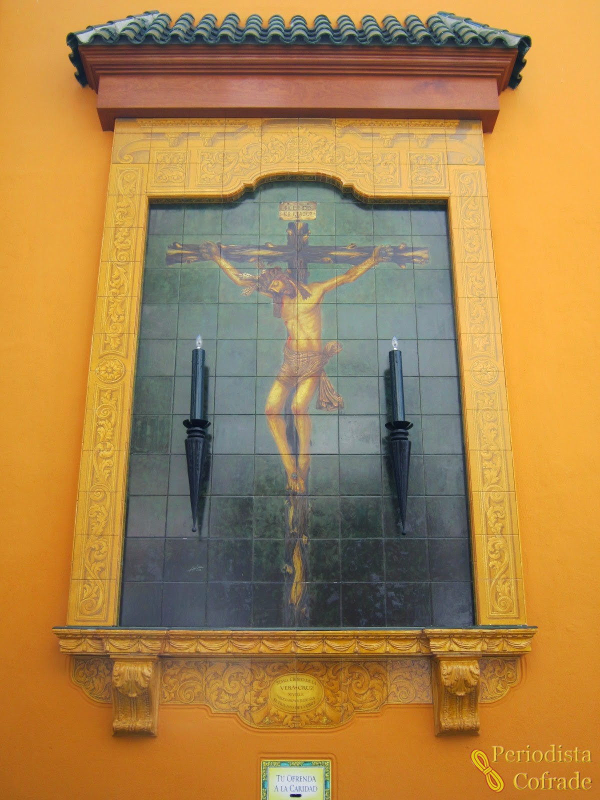 Azulejo del Ntro. Padre de Jesús de la Vera Cruz. Ángel Lora Serrano, 2012. Capilla del Dulce Nombre de Jesús. Sevilla, Andalucía, España.